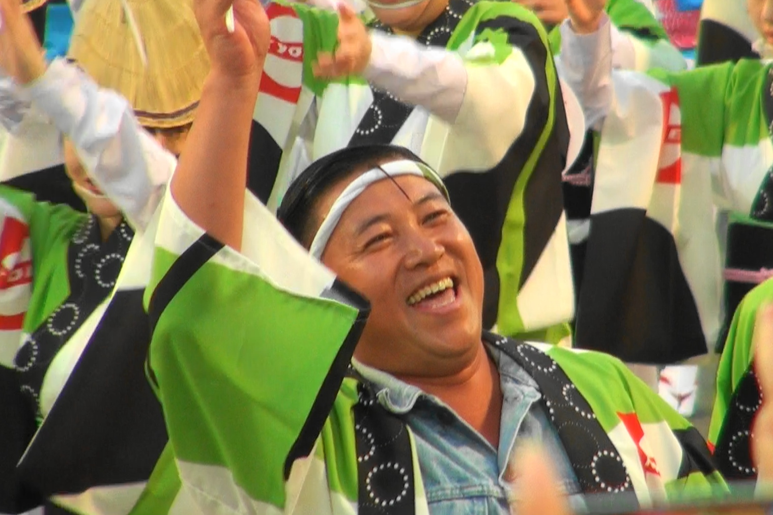 徳島市の阿波おどりに参加するスギちゃん。2016年8月13日。徳島市役所前演舞場。